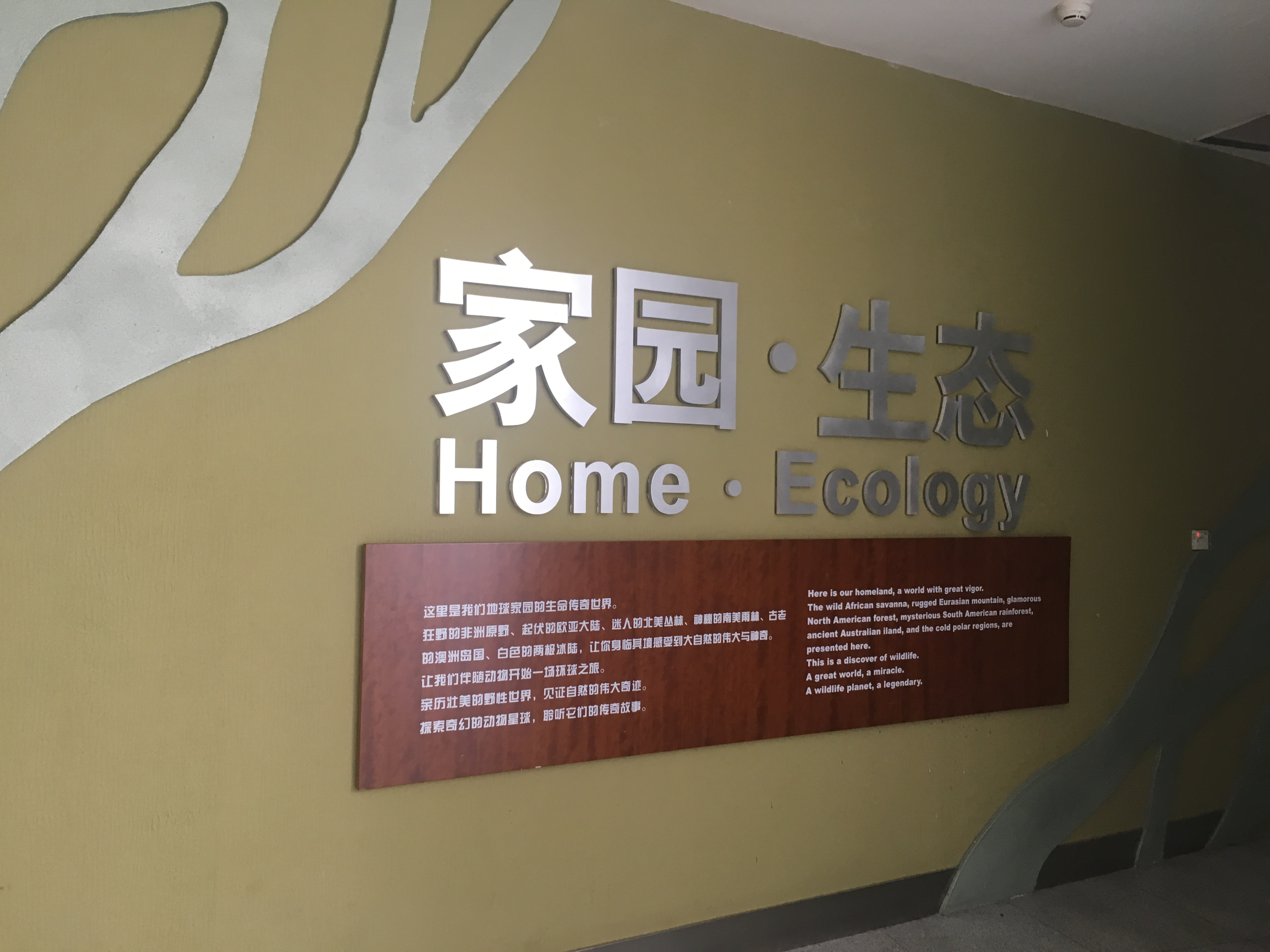 中文（中国大陆）: 天津自然博物馆“家园·生态”展区